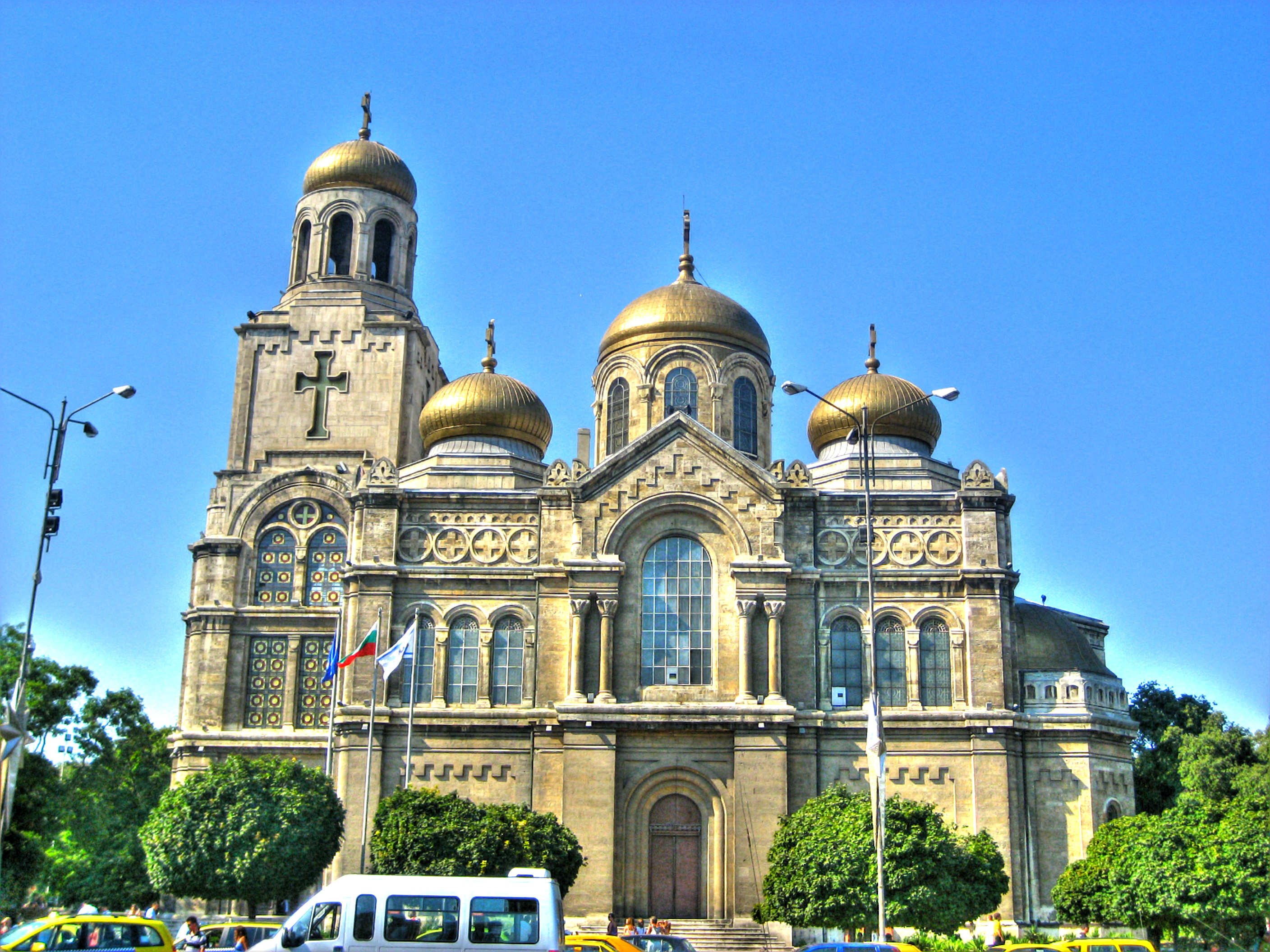 Успенский собор (Варна)